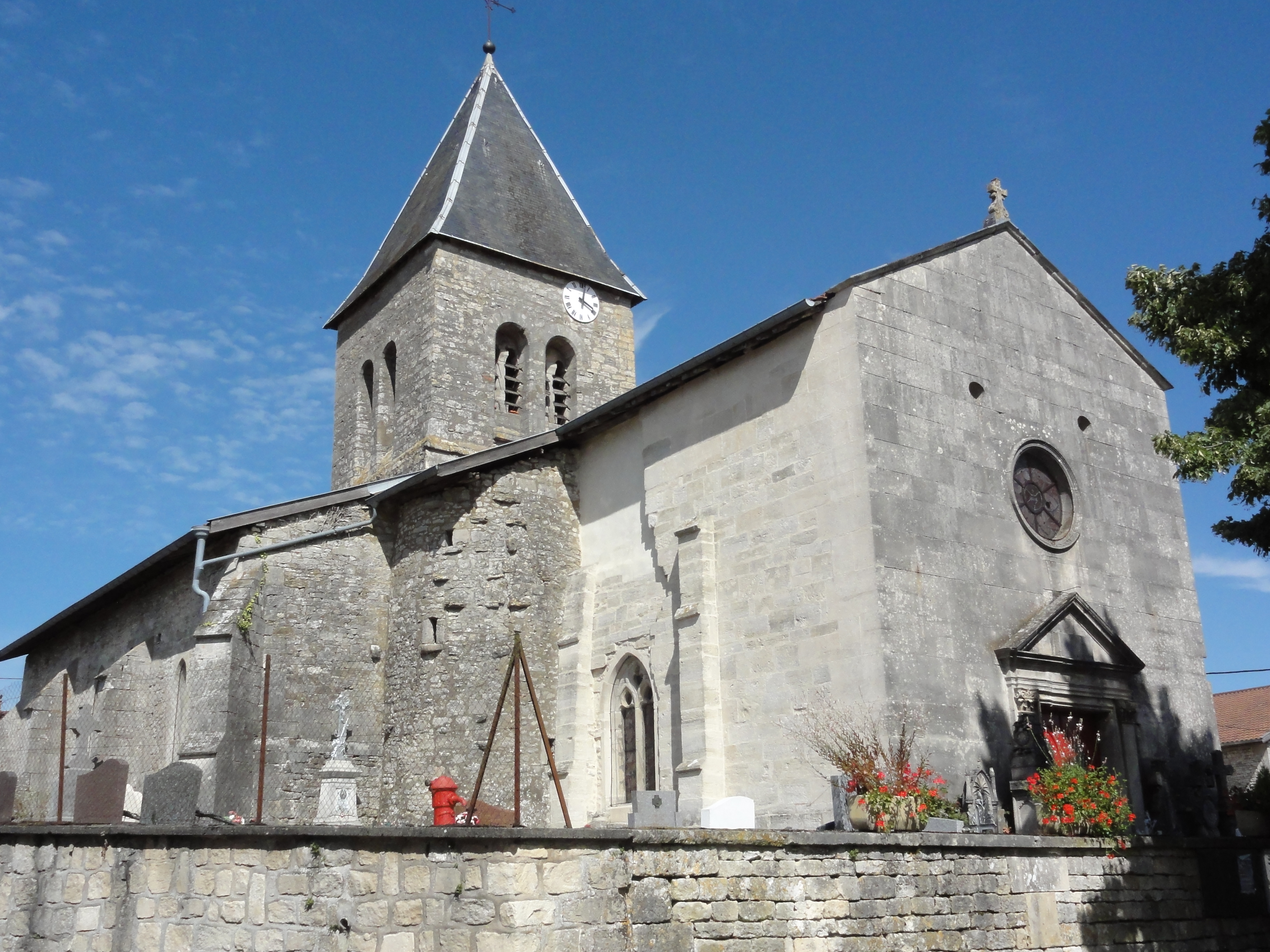 Ménil-sur-Saulx (Meuse) église